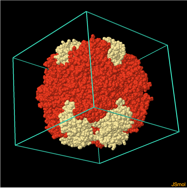 En aquesta imatge es veuen les subunitats S en les capes inferior i superior